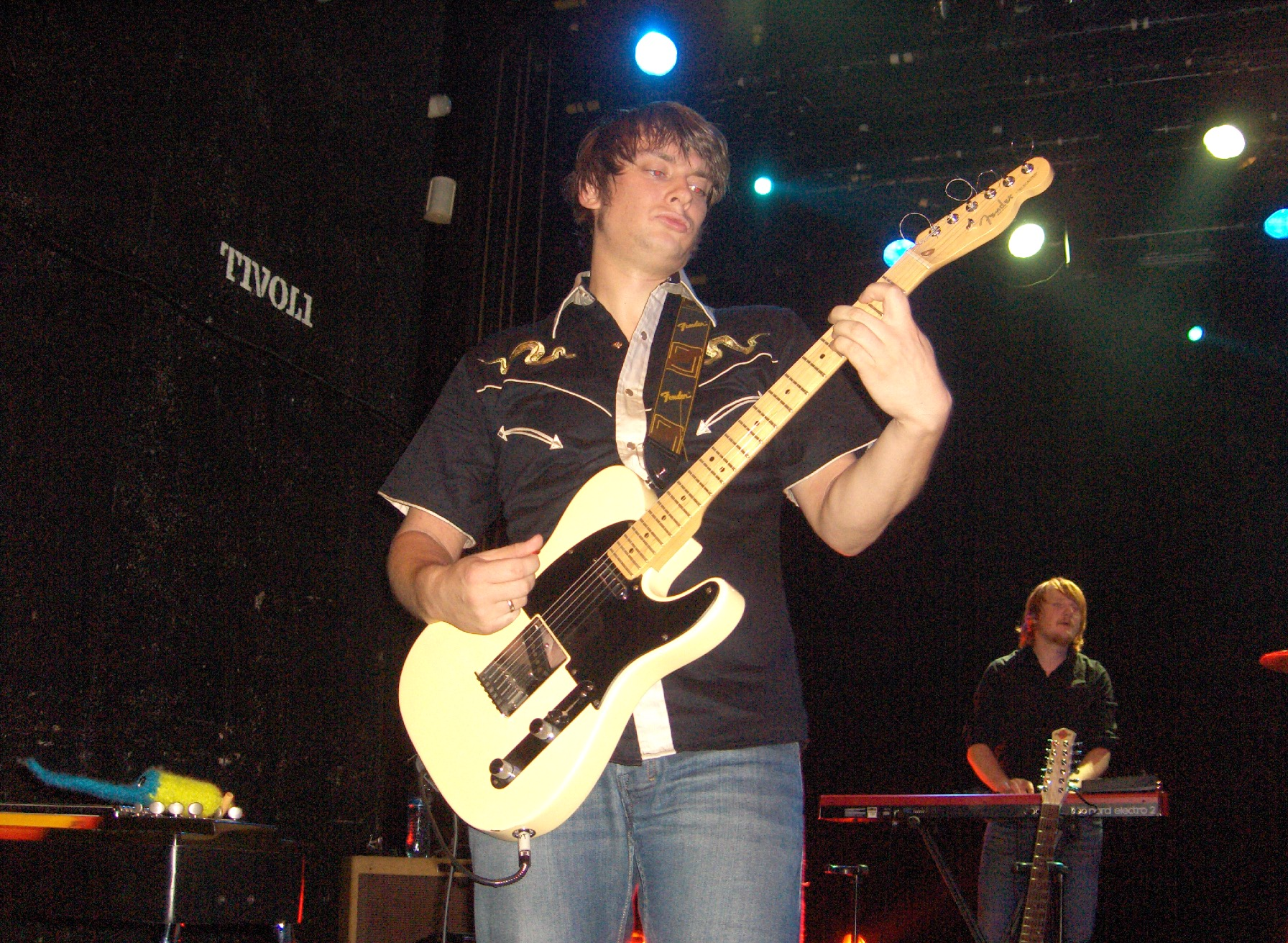 Deze foto heb ik gemaakt tijdens een concert van Maria Mena